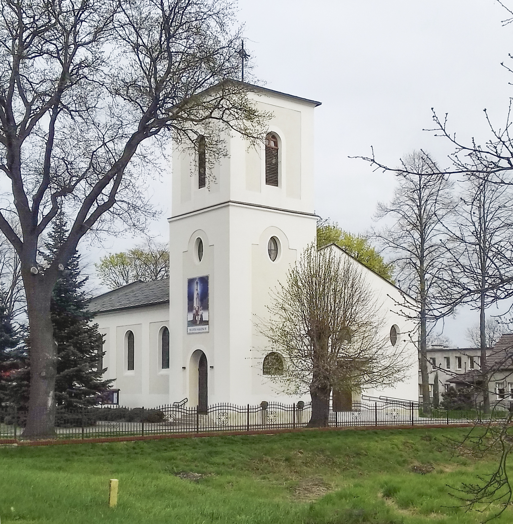 Postewangelicki kościół pod wezwaniem Świętych Apostołów Piotra i Pawła w Serbach - widok od strony zachodniej